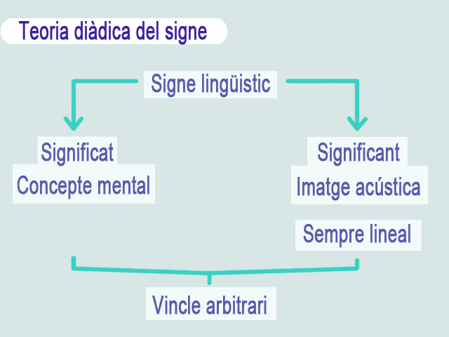 Esquema de la teoria diàdica de Saussure